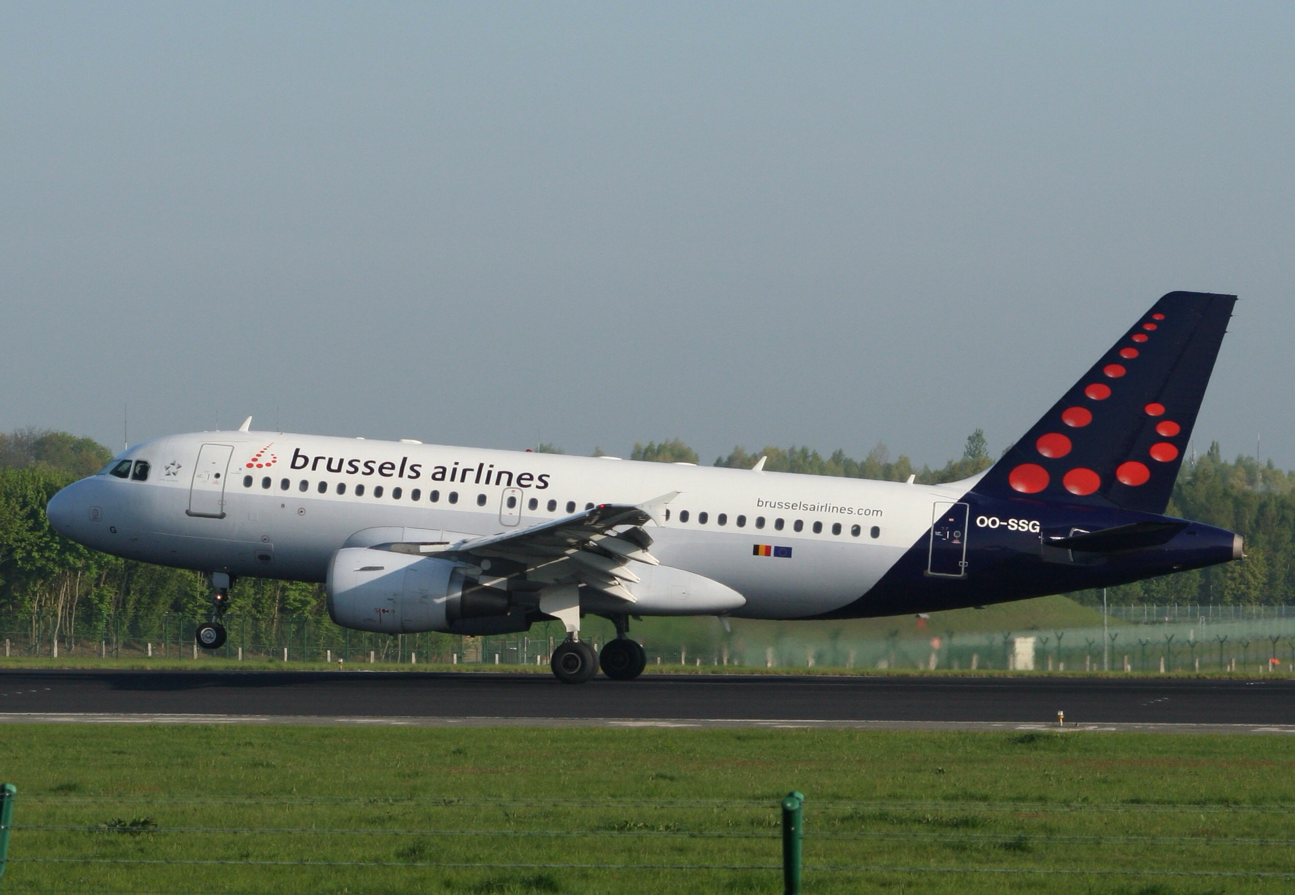 Brussels Airlines Airbus A319-112 (oo-ssg) landing at Brussels Airport